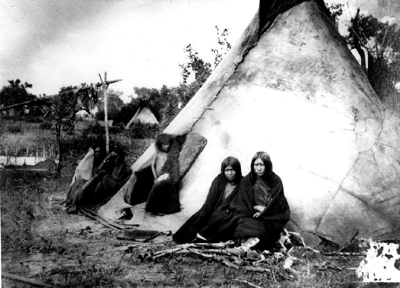 Arapaho camp